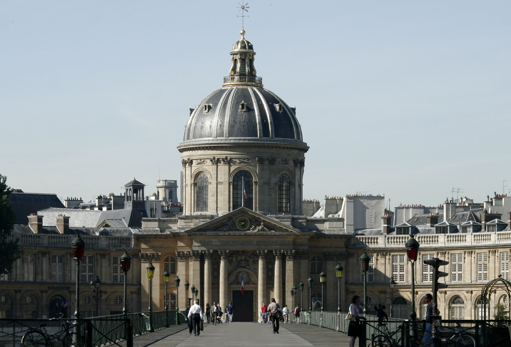 El Instituto de Francia, sede de la Academia francesa